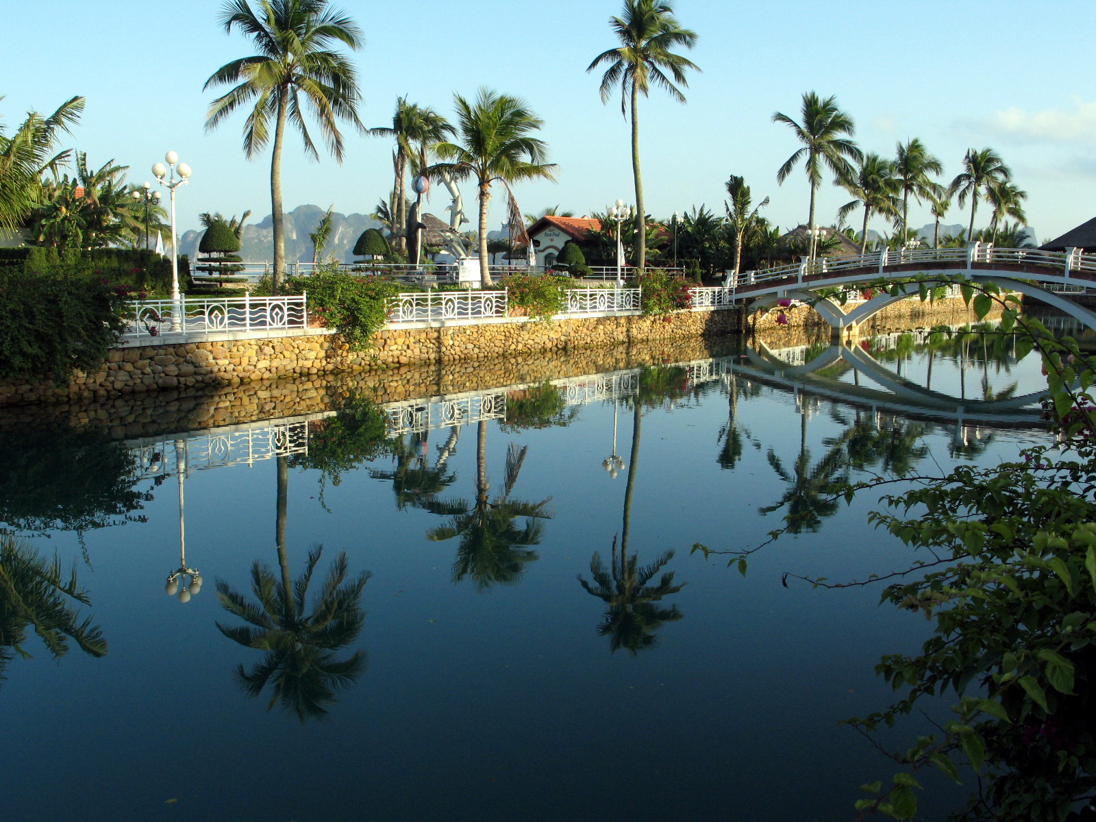 Scenery on Tuần Châu island